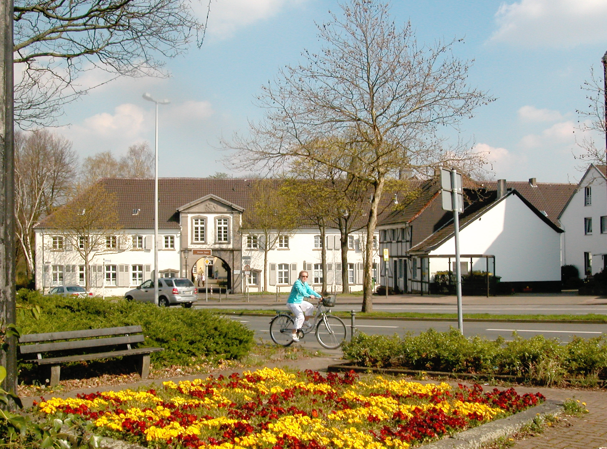 Kloster Saarn in Mülheim an der Ruhr Kamera-Position: Klostermarkt, Blick nach Osten Objekt:51°24′10.8″N 6°52′50.5″E / 51.403°N 6.880694°E